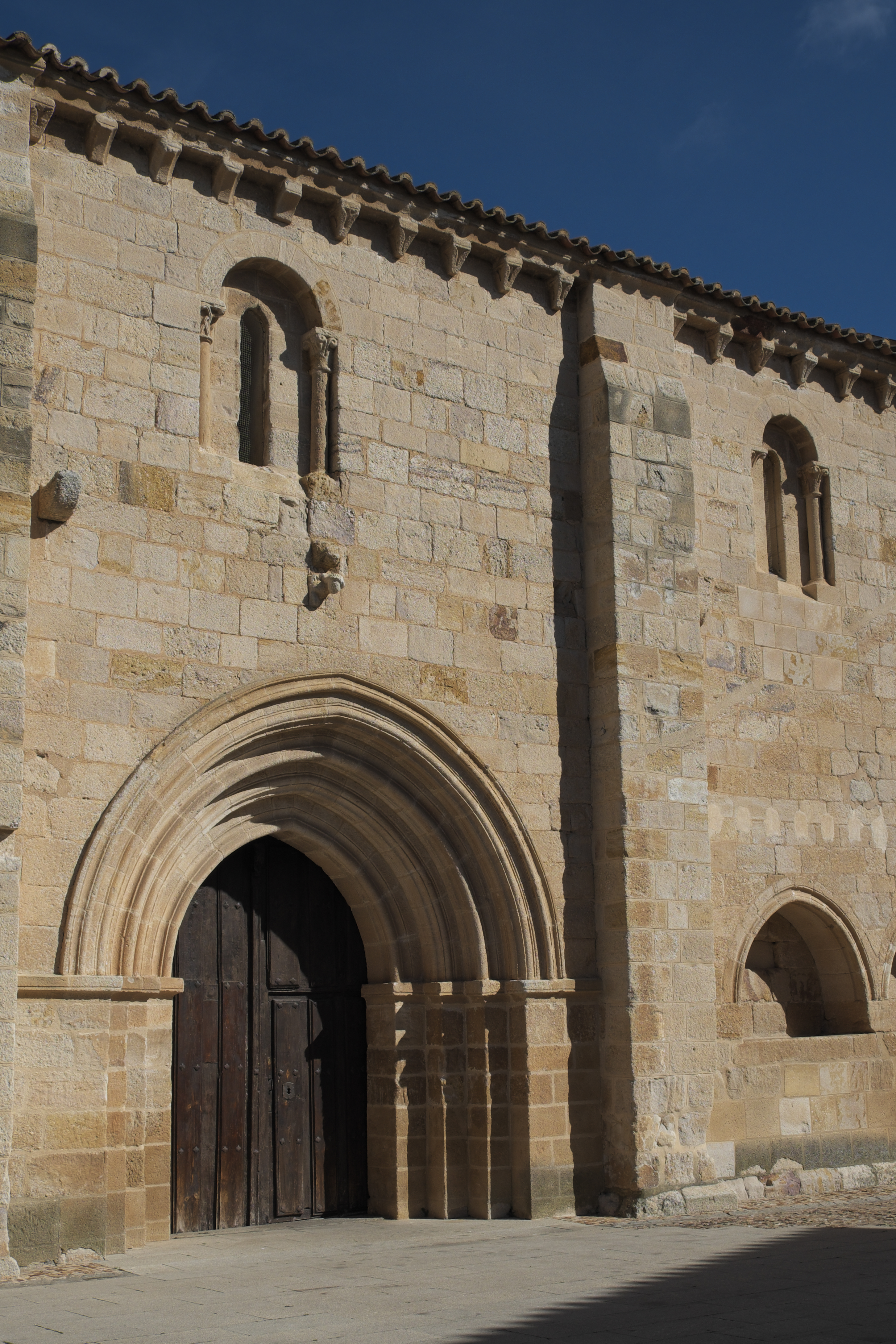 Kirche San Isidoro in Zamora (Kastilien-León/Spanien), Südfassade mit Portal